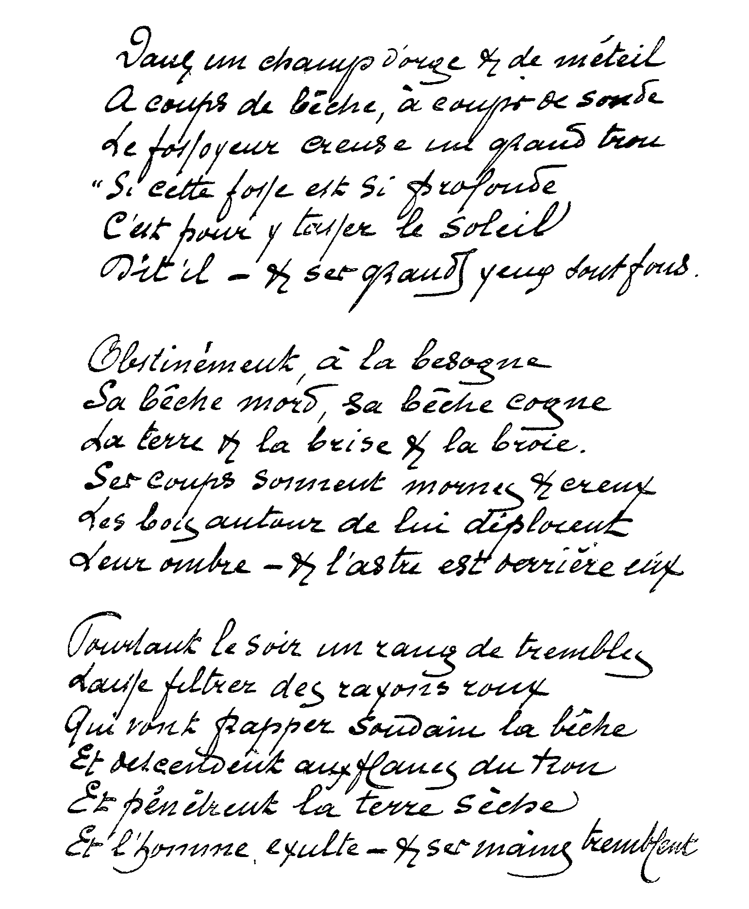 Dans un champ d'orge et de méteil. Poème autographe d'Émile Verhaeren (1855-1816)